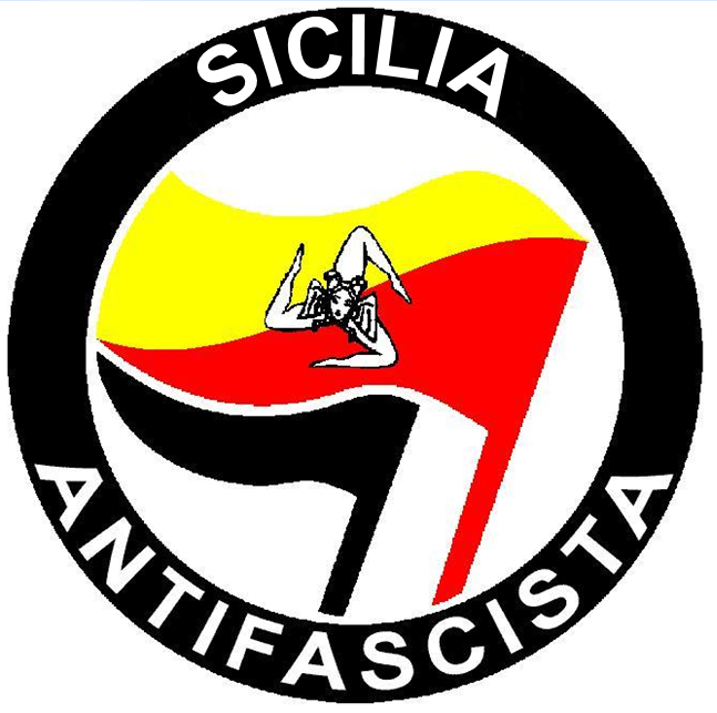 Sicilianu: Sicilia Antifascista